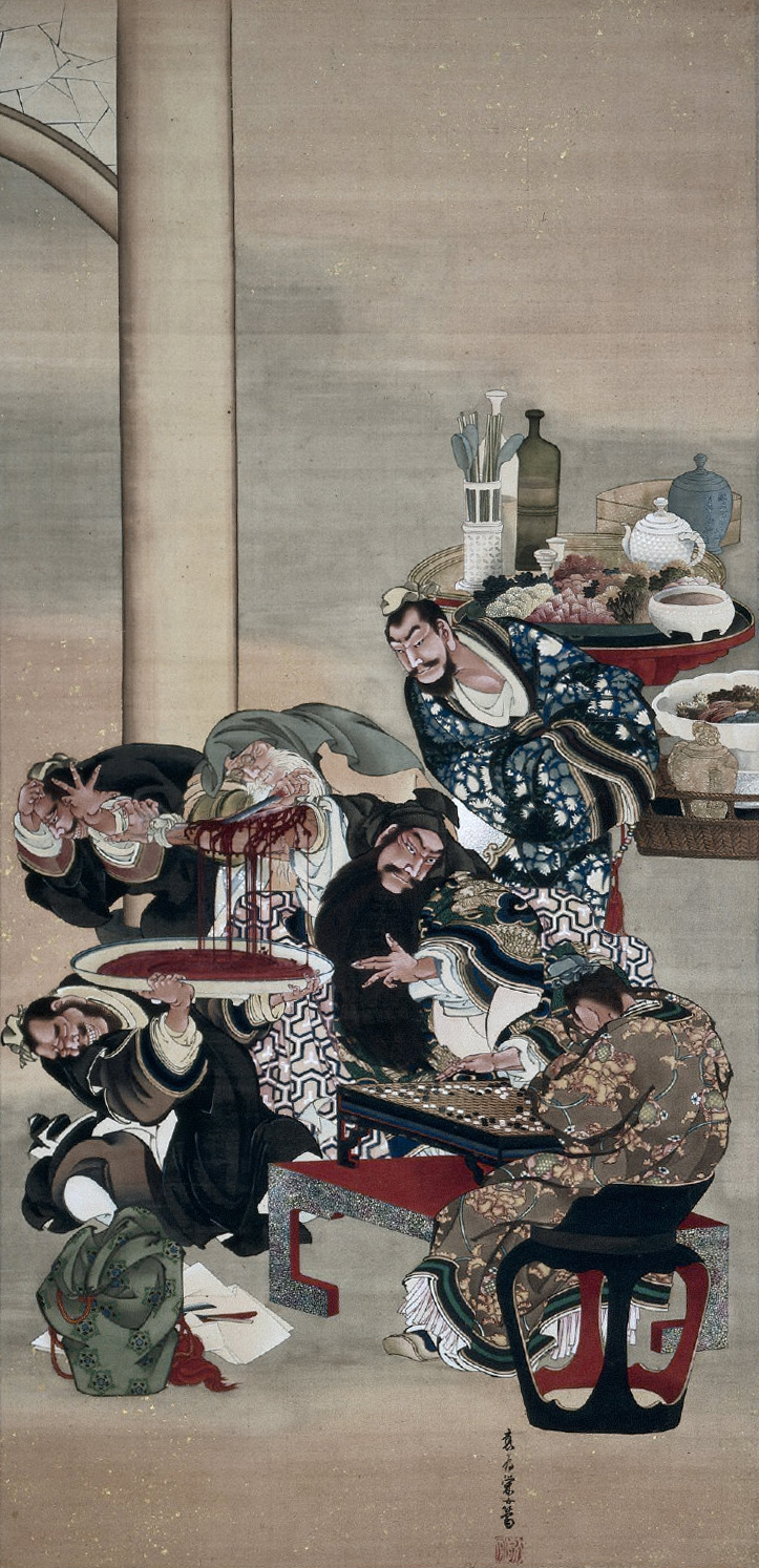 Le Docteur Ka Da opère le bras de Guan Yu, qui continue à jouer au go